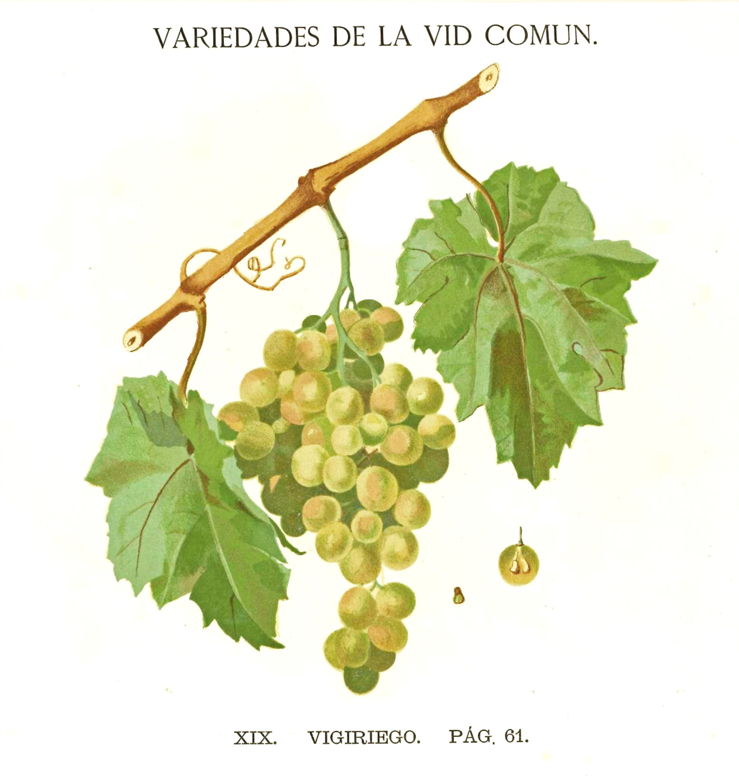 Variedad de la vid vigiriego común, cromolitografía realizada por J. Guzman hacia para la edición ilustrada de 1879 del libro Ensayo sobre las variedades de la vid comun que vegetan en Andalucía de Simón de Rojas Clemente y Rubio.